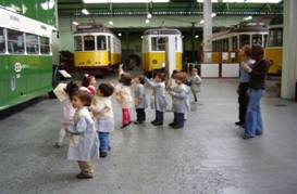 Atividades